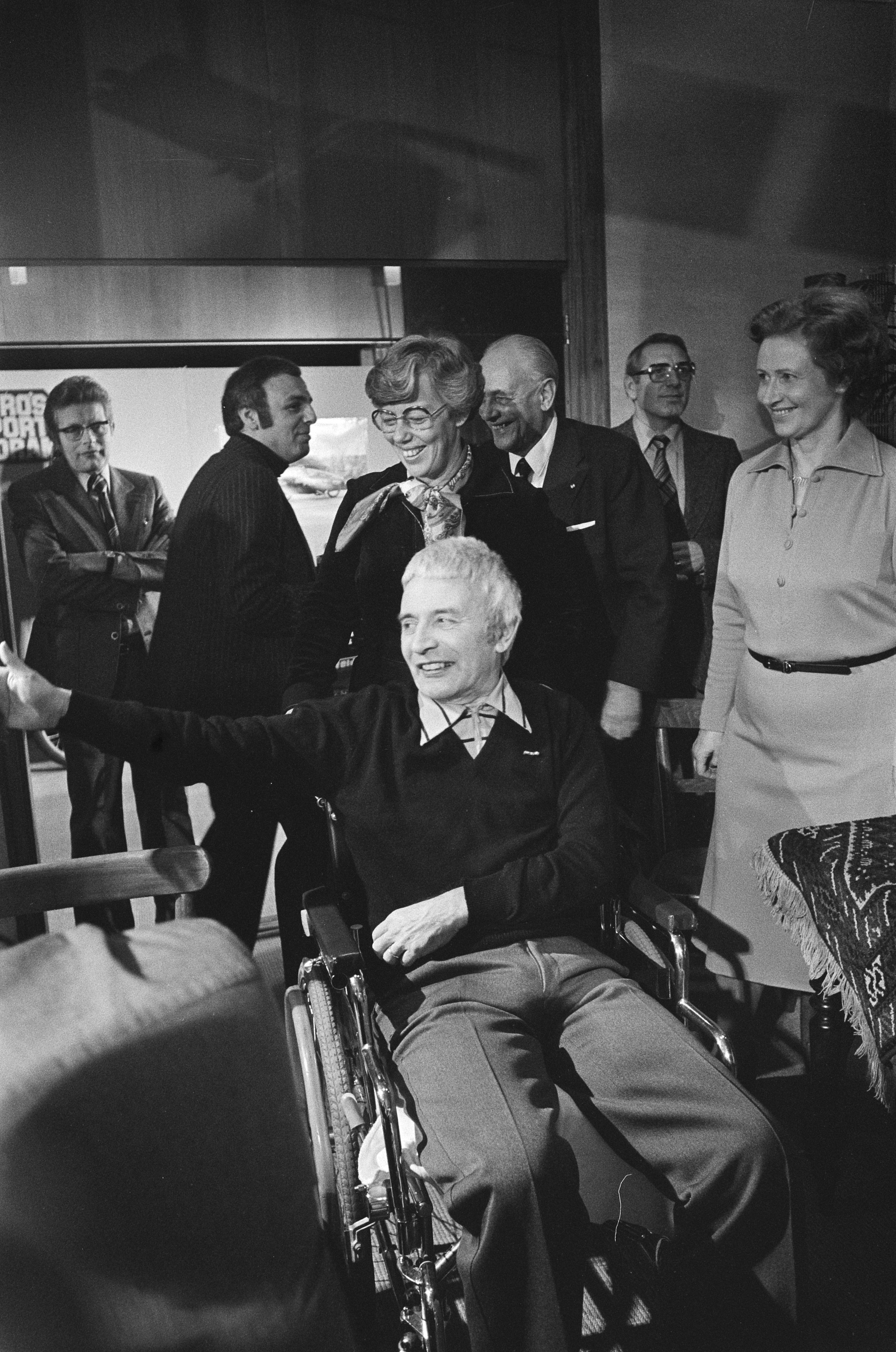 Collectie / Archief : Fotocollectie Anefo Reportage / Serie : Sportman van het Jaar 1977 Beschrijving : Voetballer Abe Lenstra (in rolstoel) is aanwezig bij de verkiezing Datum : 6 januari 1978 Locatie : Amsterdam, Noord-Holland Trefwoorden : sport, verkiezingen, voetbal Persoonsnaam : Lenstra, Abe Fotograaf : Peters, Hans / Anefo Auteursrechthebbende : Nationaal Archief Materiaalsoort : Negatief (zwart/wit) Nummer archiefinventaris : bekijk toegang 2.24.01.05 Bestanddeelnummer : 929-5127